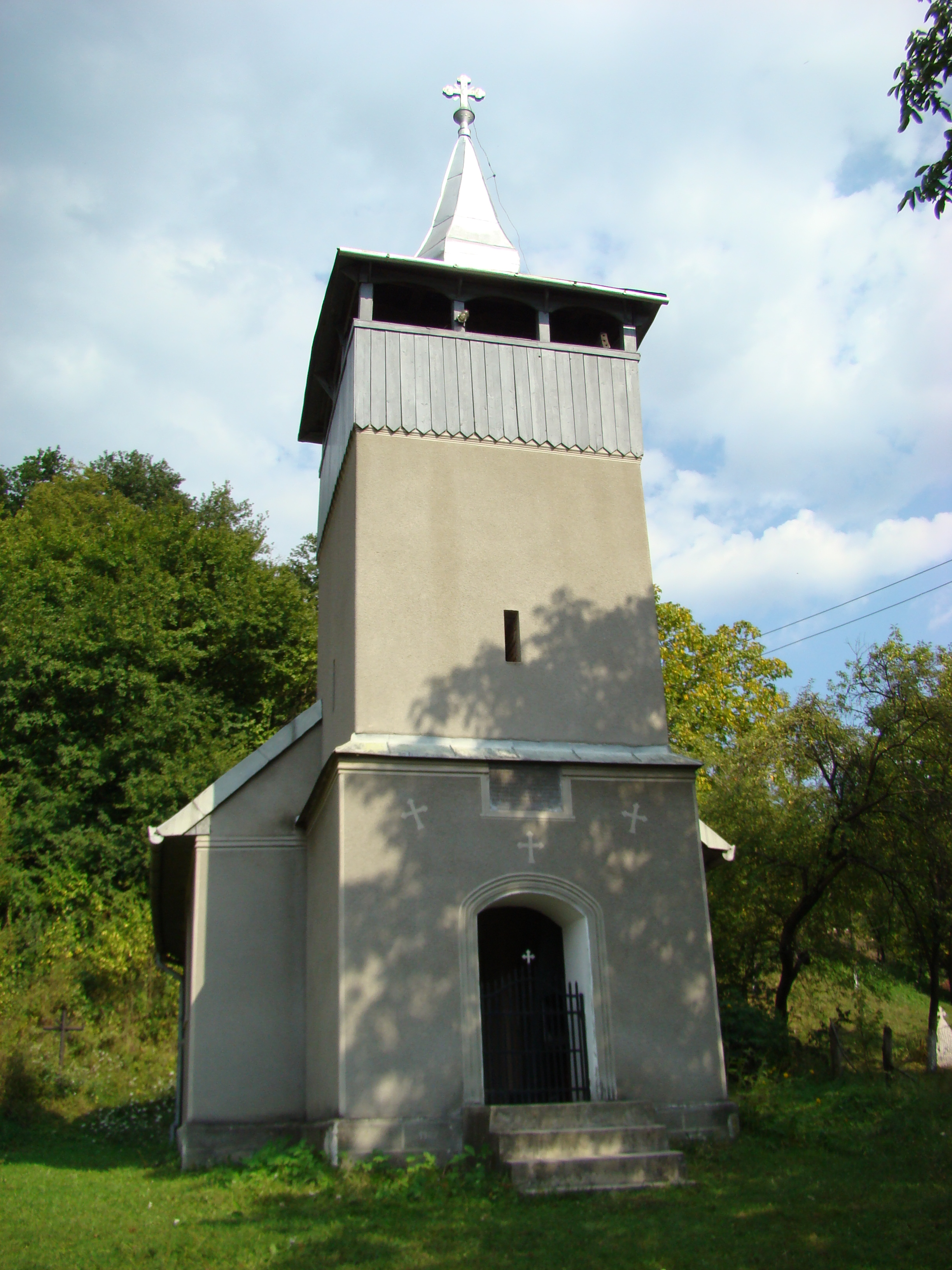 Biserica Sfântul Ierarh Nicolae din Zdrapti, Hunedoara